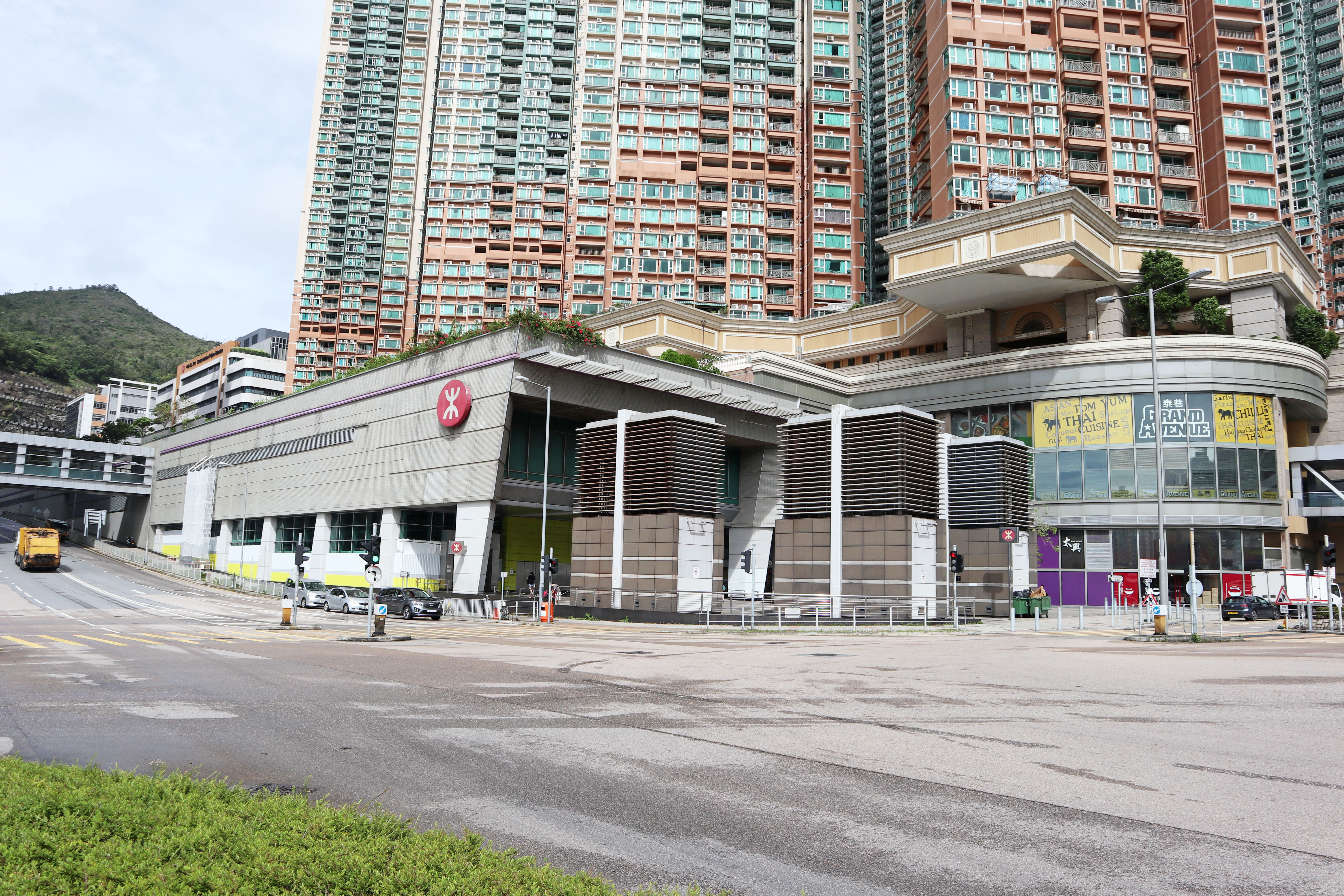 港鐵調景嶺站外觀